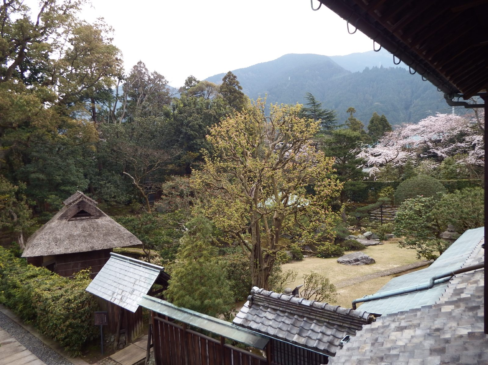 旧広瀬邸二階より庭園を見る